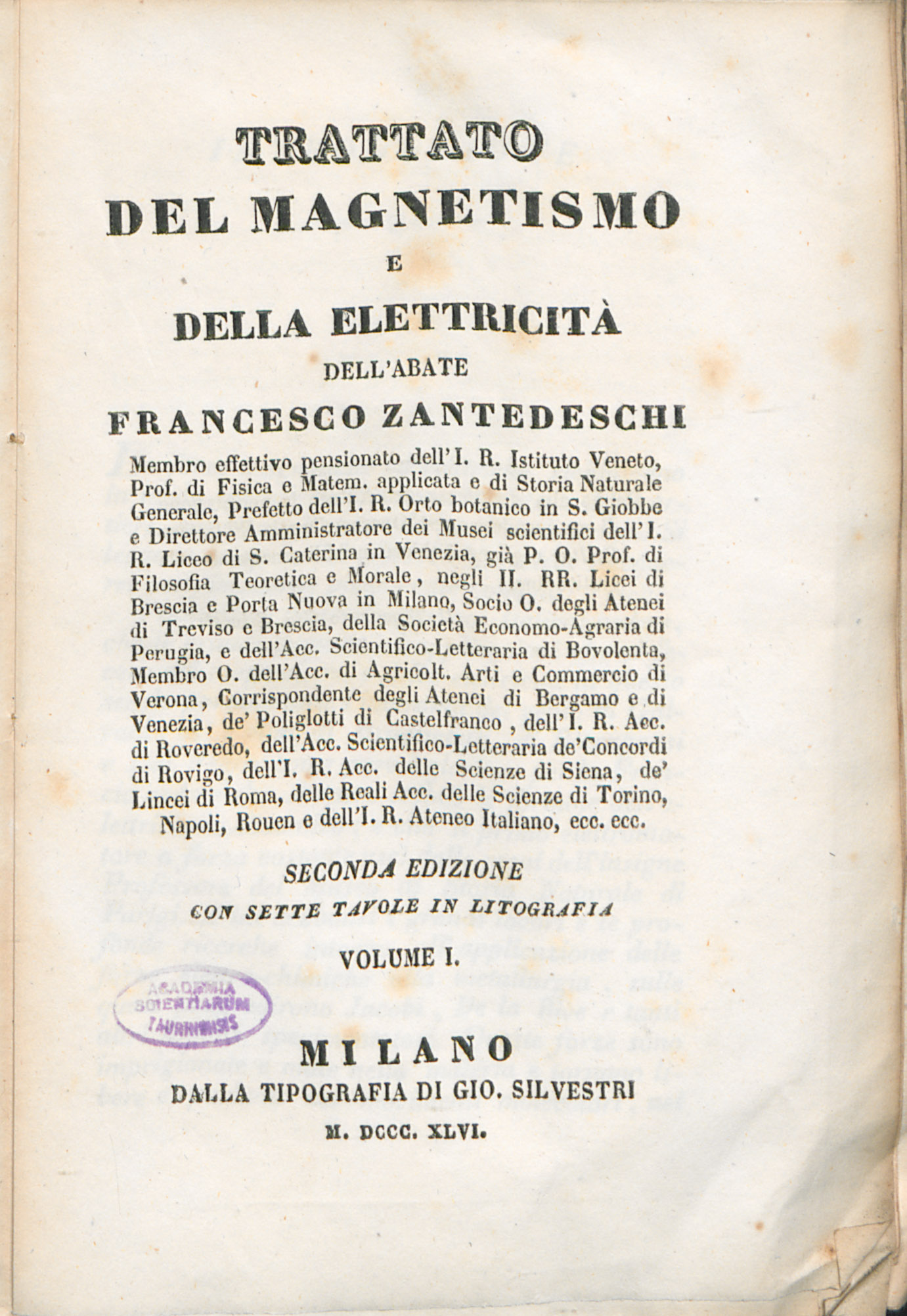 Trattato del magnetismo e della elettricità. 1 / dell'ab. Francesco Zantedeschi. - Milano : dalla tipografia di Gio. Silvestri, 1846. - 358 p., 3 c. di tav. : ill. ; 17 cm . Copertina